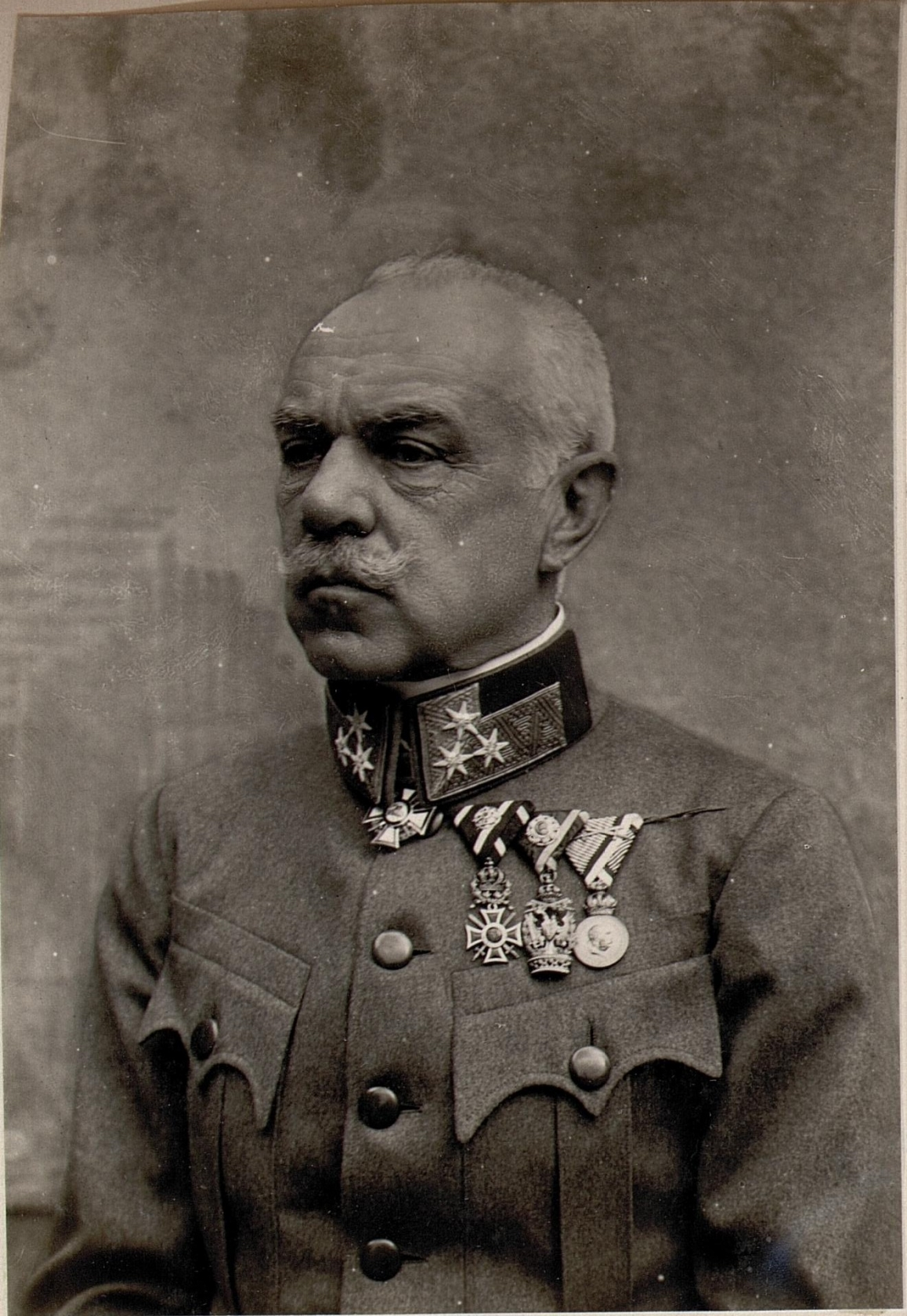 Trient: Exzellenz Krautwald. General der Infanterie, .Kommandant des III. Korps